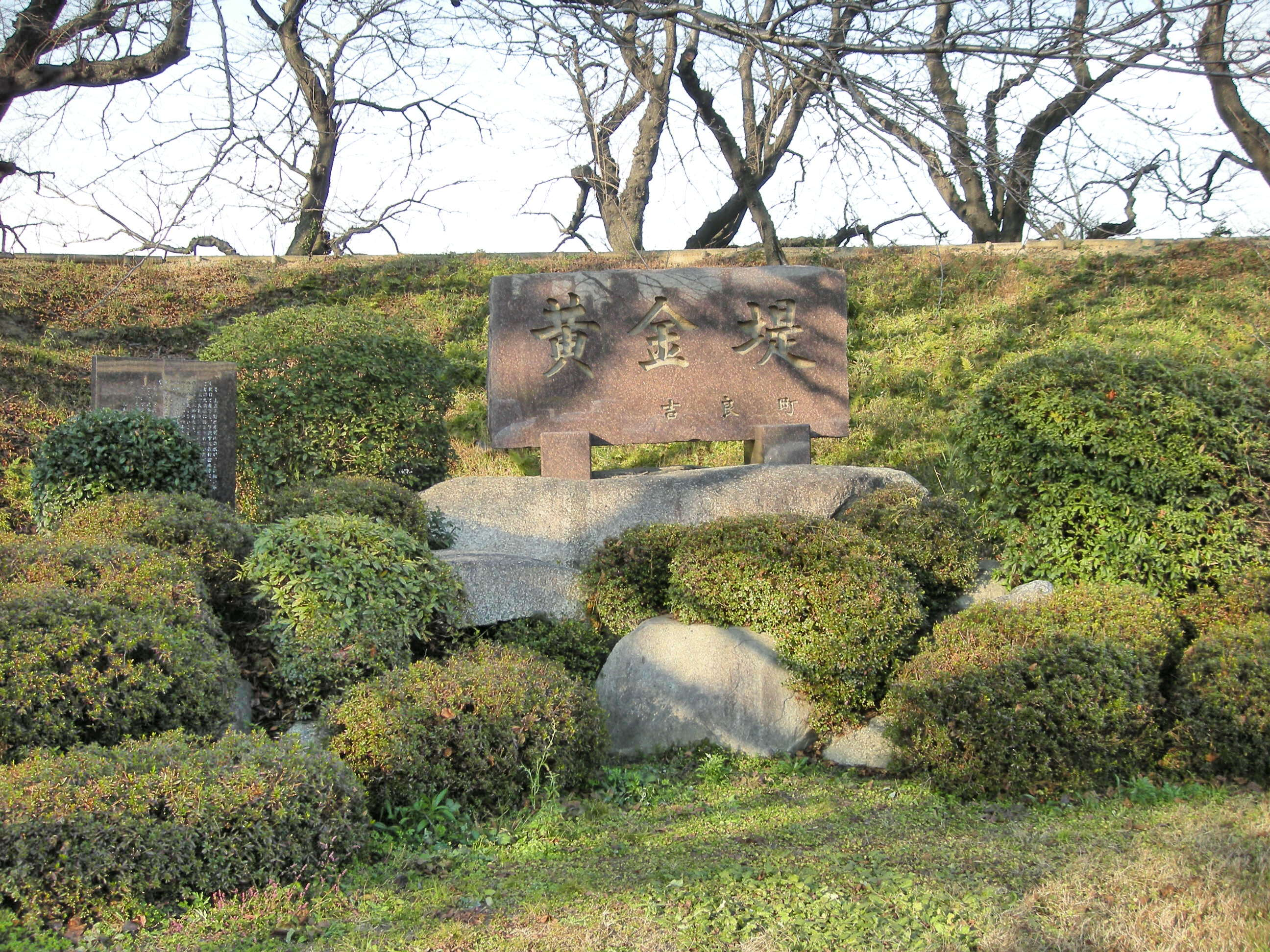 Koganedutsumi（黄金堤）